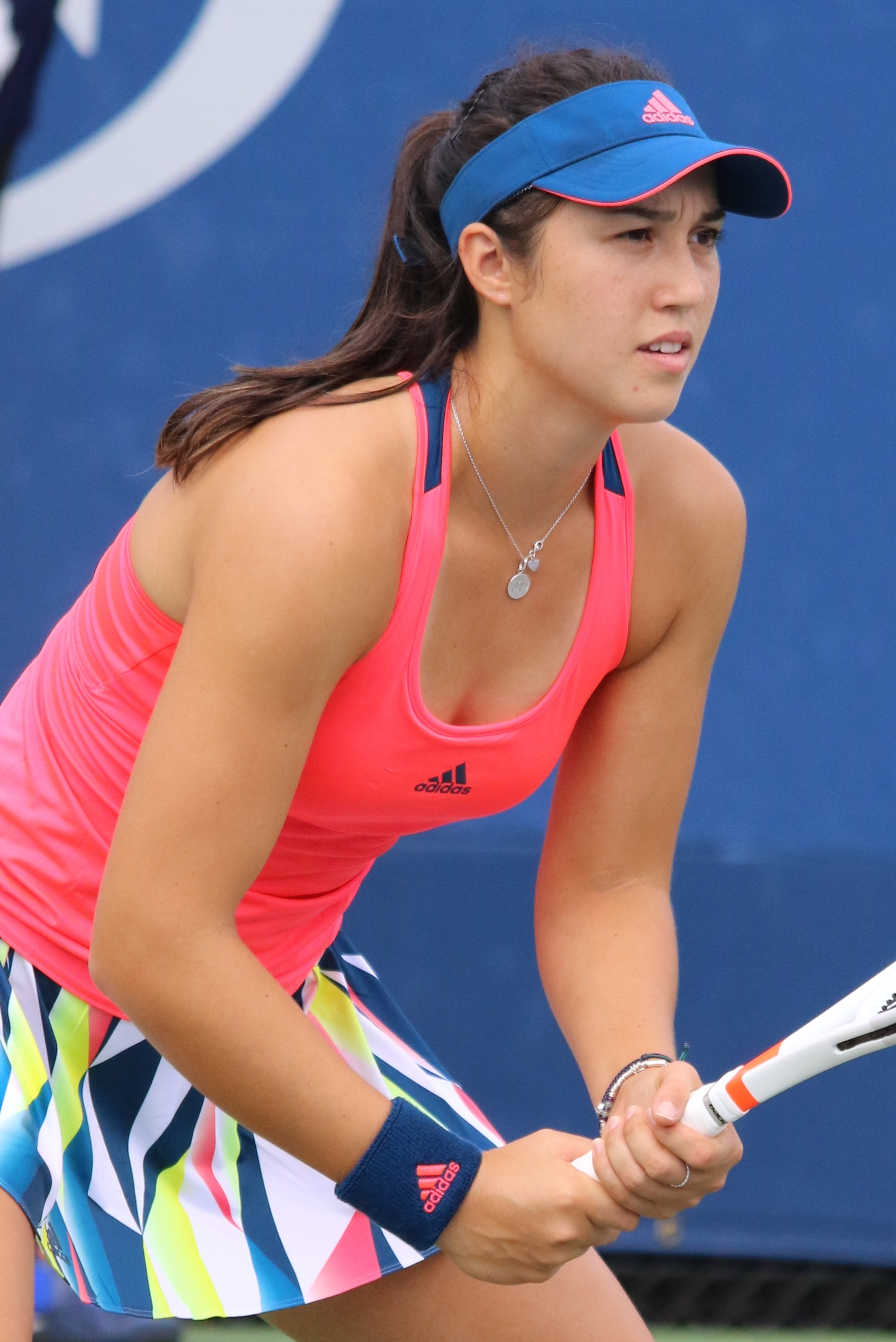 Chirico US16 (7)